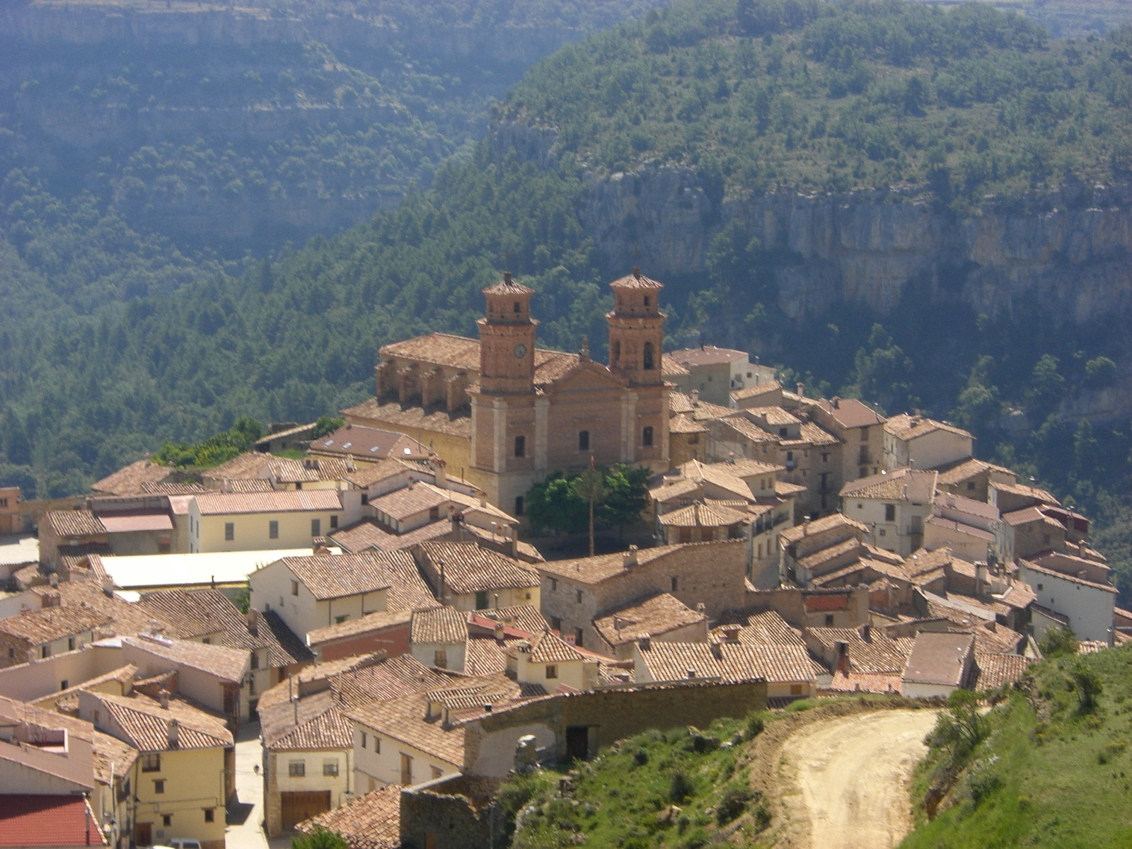 Vistas panorámica de Villarluengo desde la subida al Montesanto